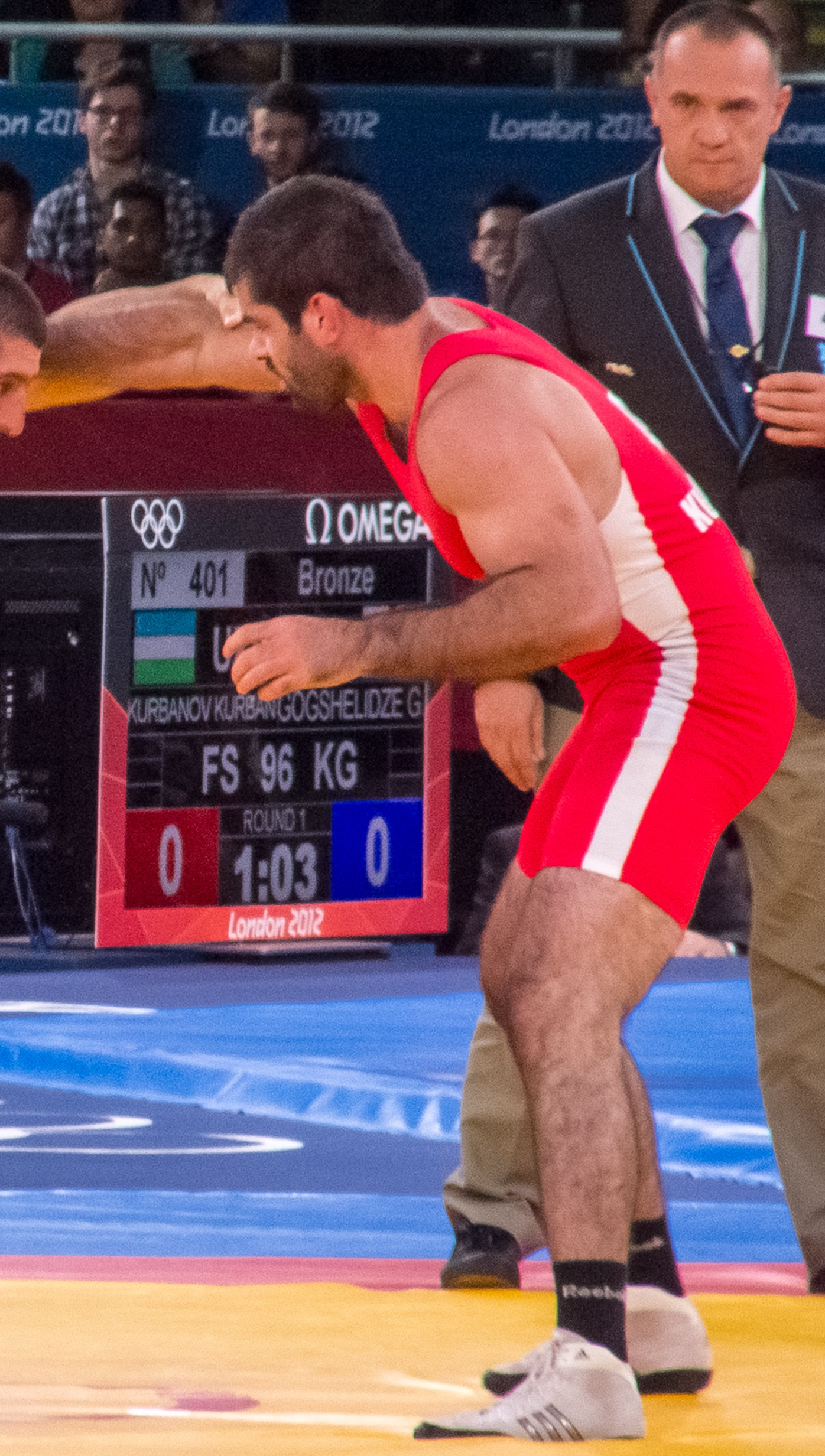 Kurban Kurbanov, 2012 Olympics